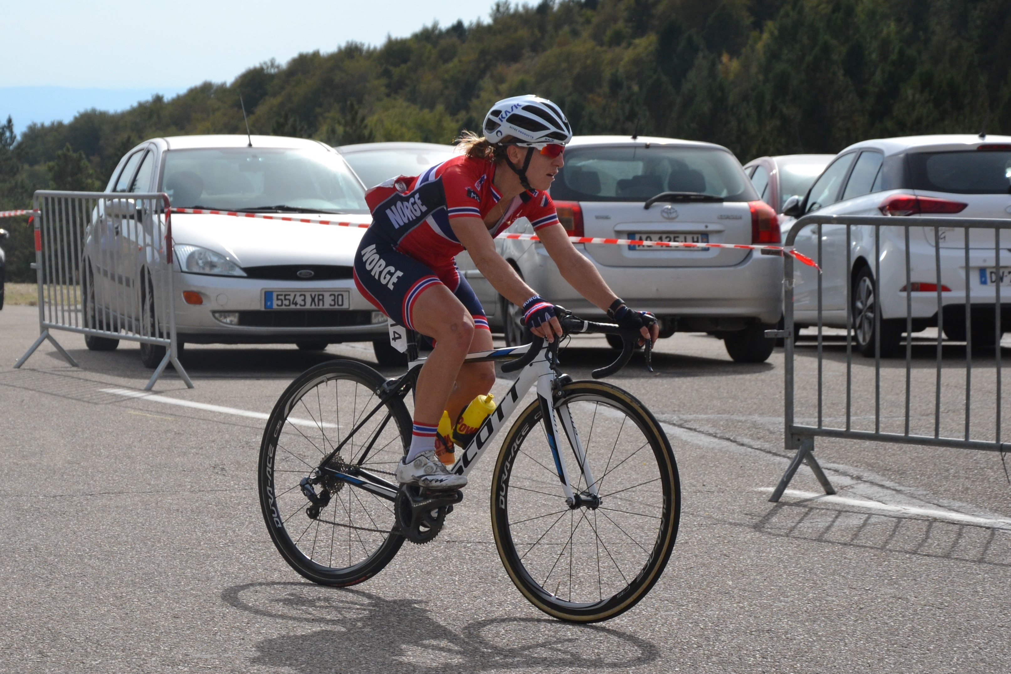 3ème étape du Tour féminin international de l'Ardèche 2016, lors de l’ascension du Mont Ventoux